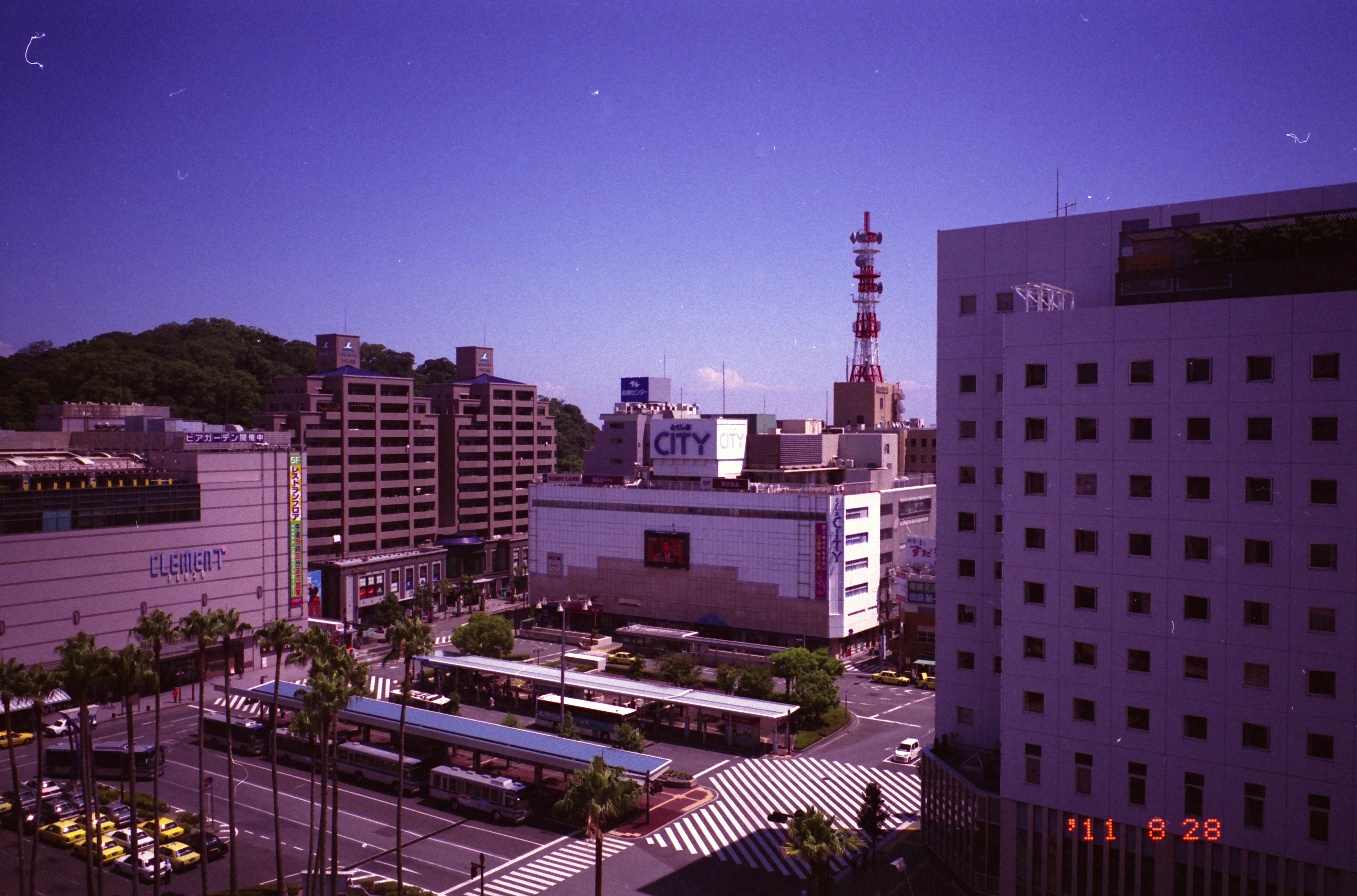 徳島駅周辺写真。そごう喫茶店より撮影。